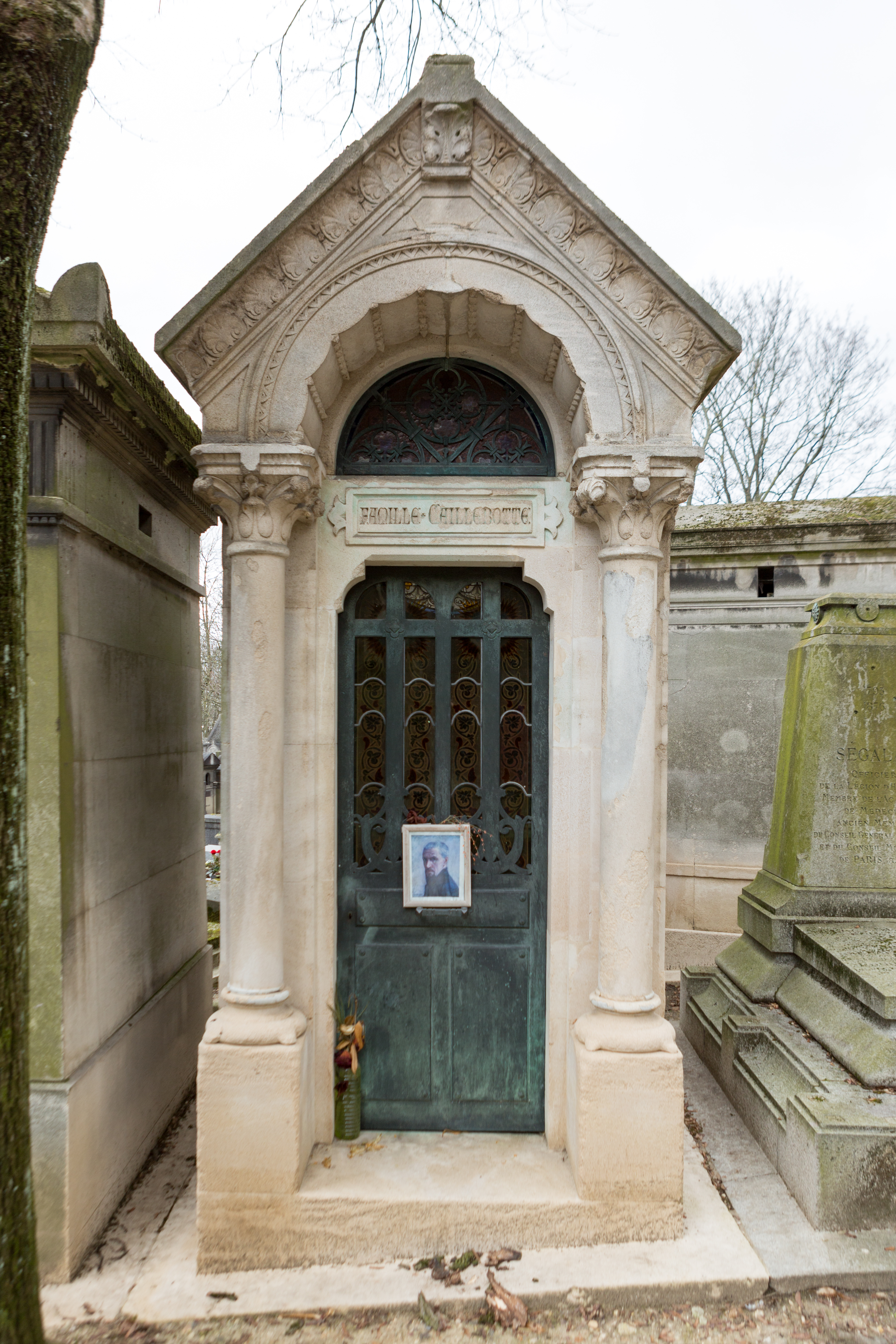 Chapelle